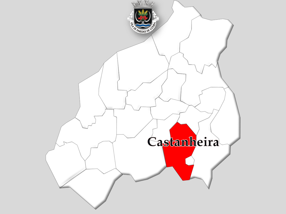 Censos 1864/2011